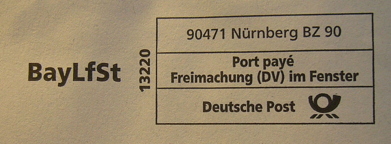 DV-Freimachung für die Deutsche Post AG (Kunde: Bayerisches Landesamt für Steuern)